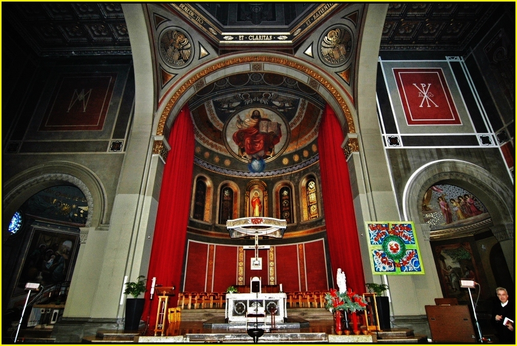 Absis de la catedral de Sant Llorenç, a Sant Feliu de Llobregat (Barcelona, Spain)